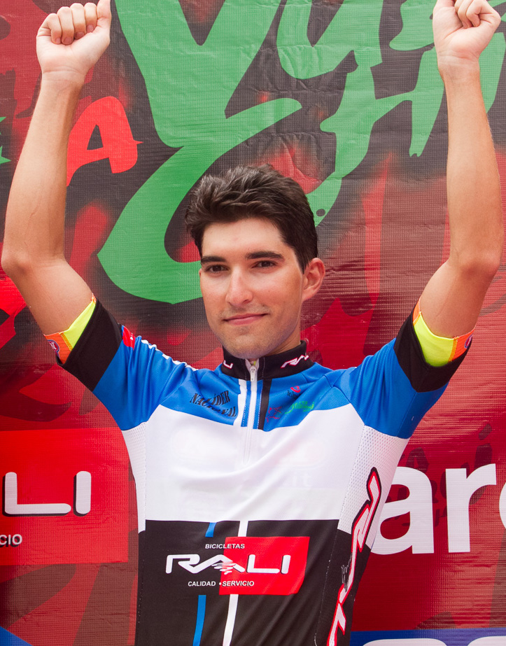 Ramón Carretero en el podio Et1. Vuelta a Chiriquí 2014 David, Chiriquí. 21 de noviembre de 2014